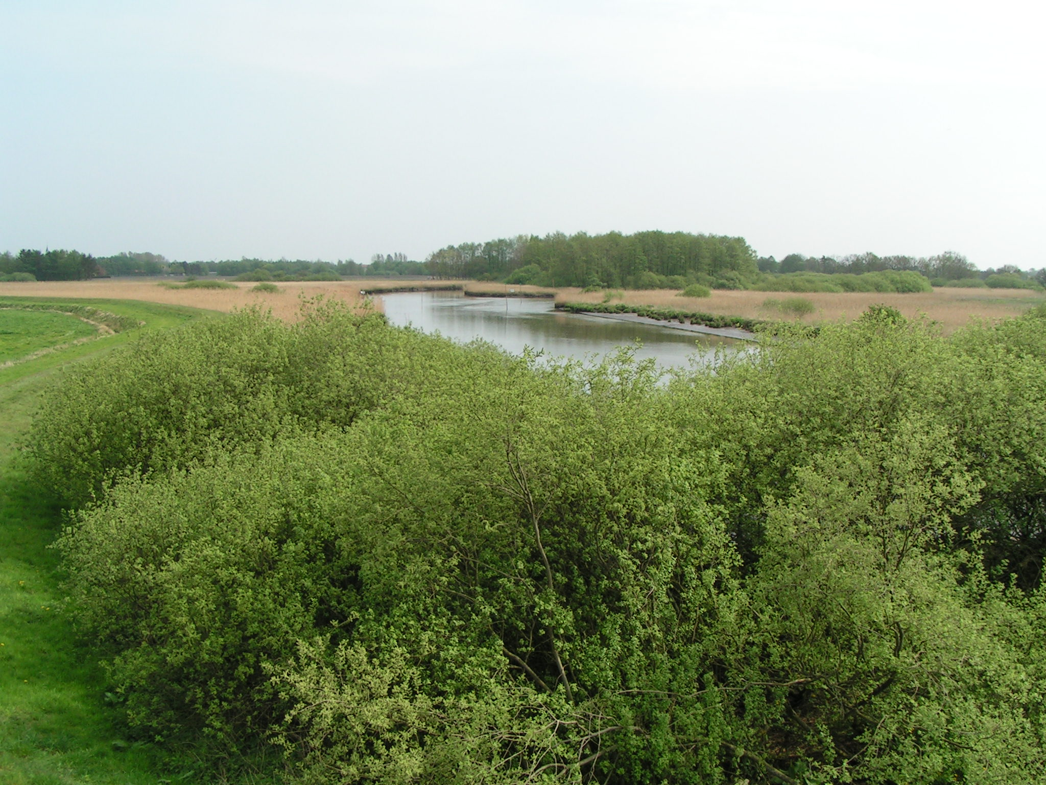 Ausblick vom Landschaftsfenster Tange auf das Barßeler Tief